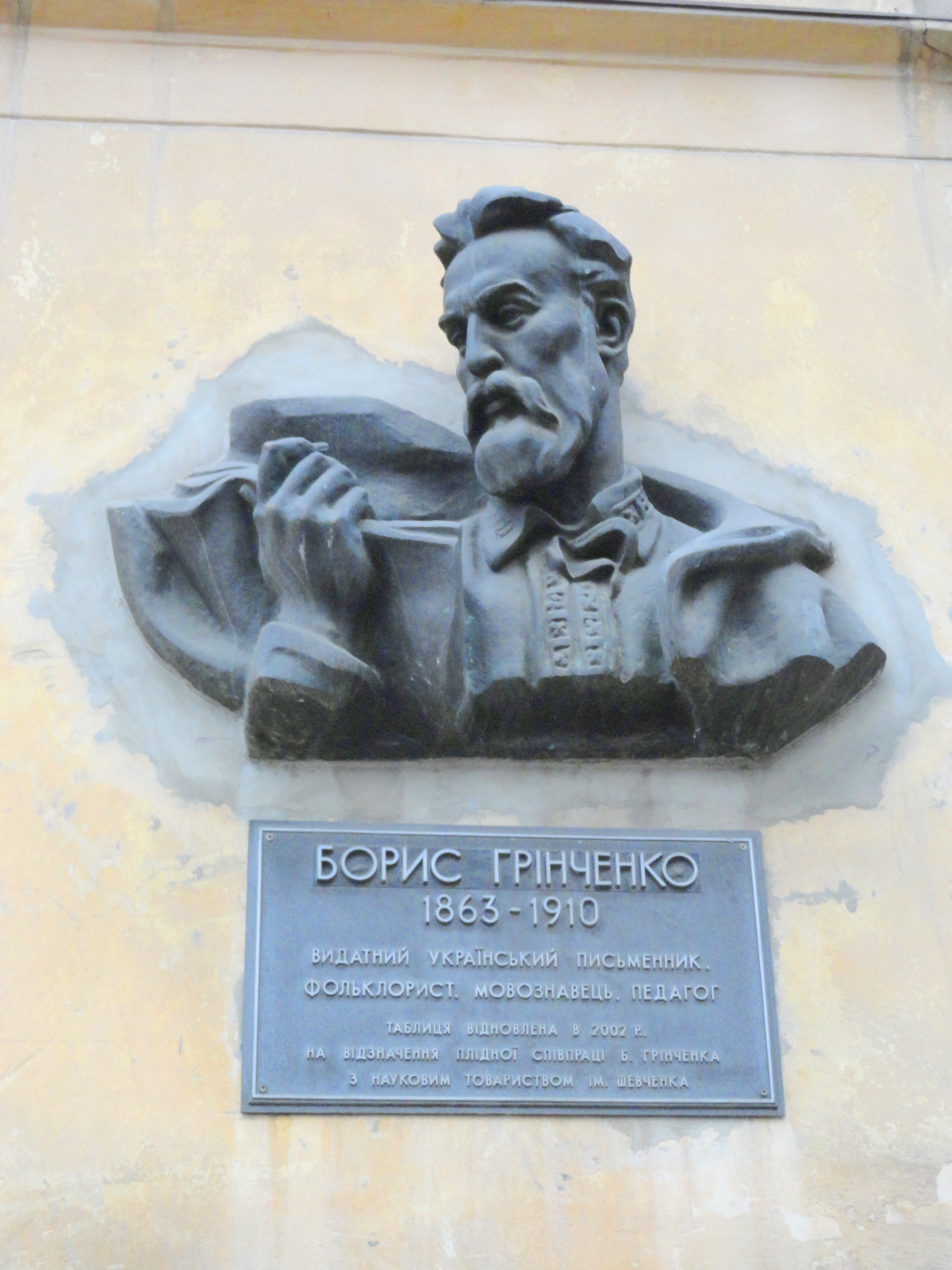 Мемориальная таблица Б. Д. Гринче́нко (1863—1910) — украинскому писателю, учёному, общественному и политическому деятелю во Львове на здании НТШ.